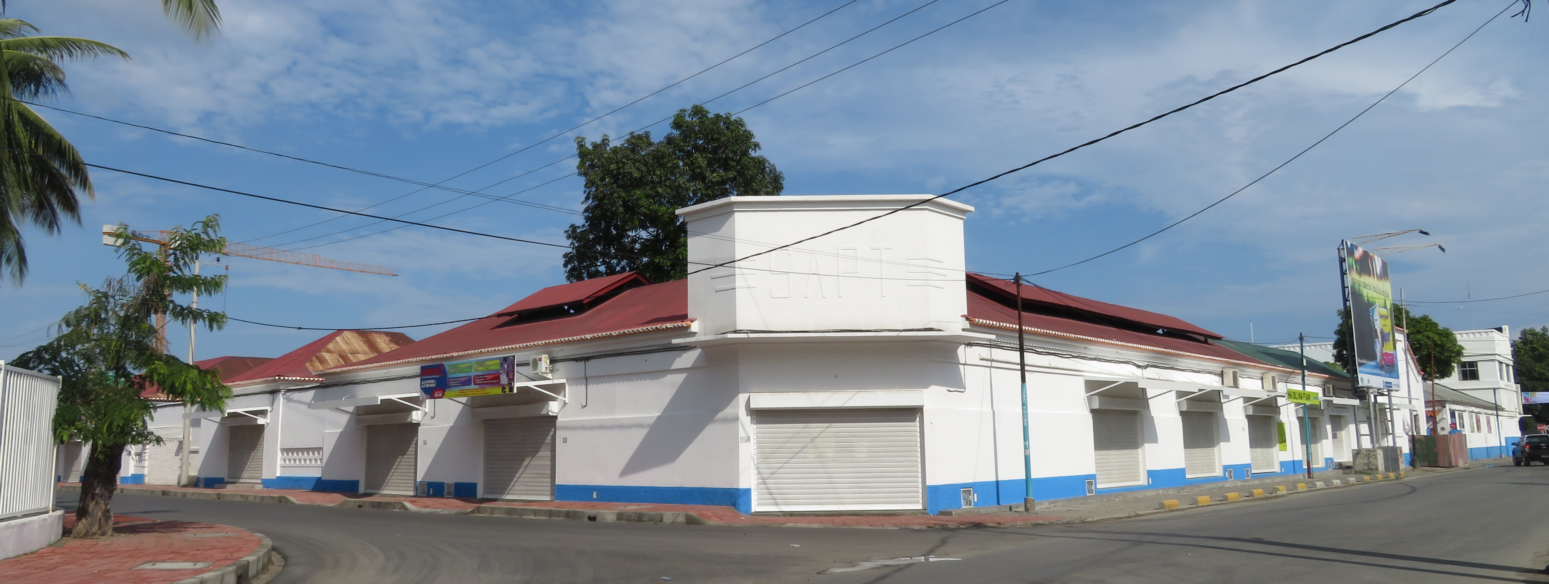 Ehem. Verwaltungsgebäude der Fa. "Sociedade Agrícola Pátria e Trabalho Lda", erbaut 1948-49, Dili, Osttimor